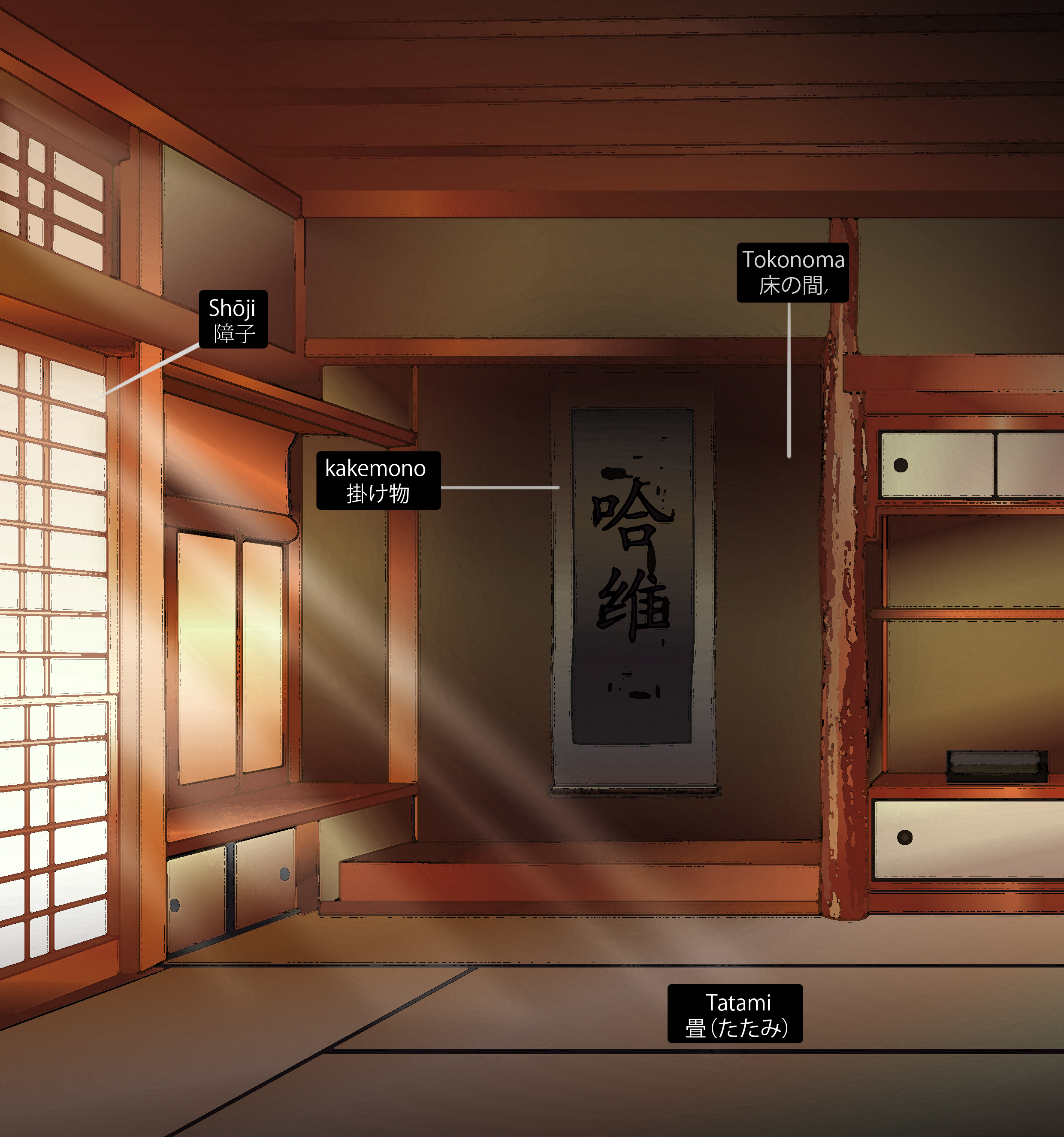 El tokonoma és un espai que se preveu a las cases japoneses tradicionals, és un espai harmònic, on s’hi col•loca un quadre i a vegades, unes flors. Aquest espai està fet per concentrar l’ombra en ella, perquè la resta de la casa queda il•luminada.